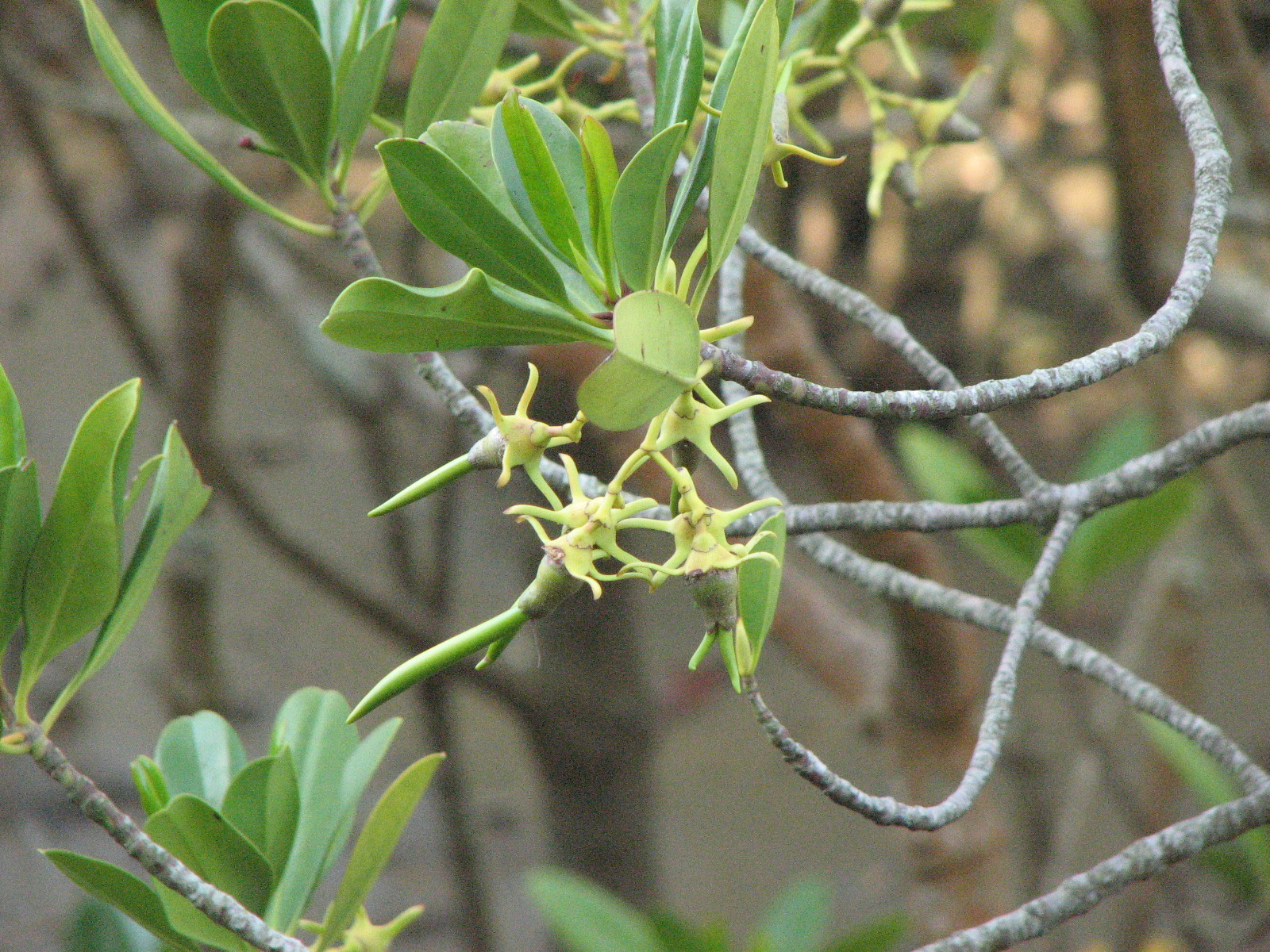 Propagules of Kandelia obovata on treetop (メヒルギの未熟胎生種子・静岡県南伊豆町)